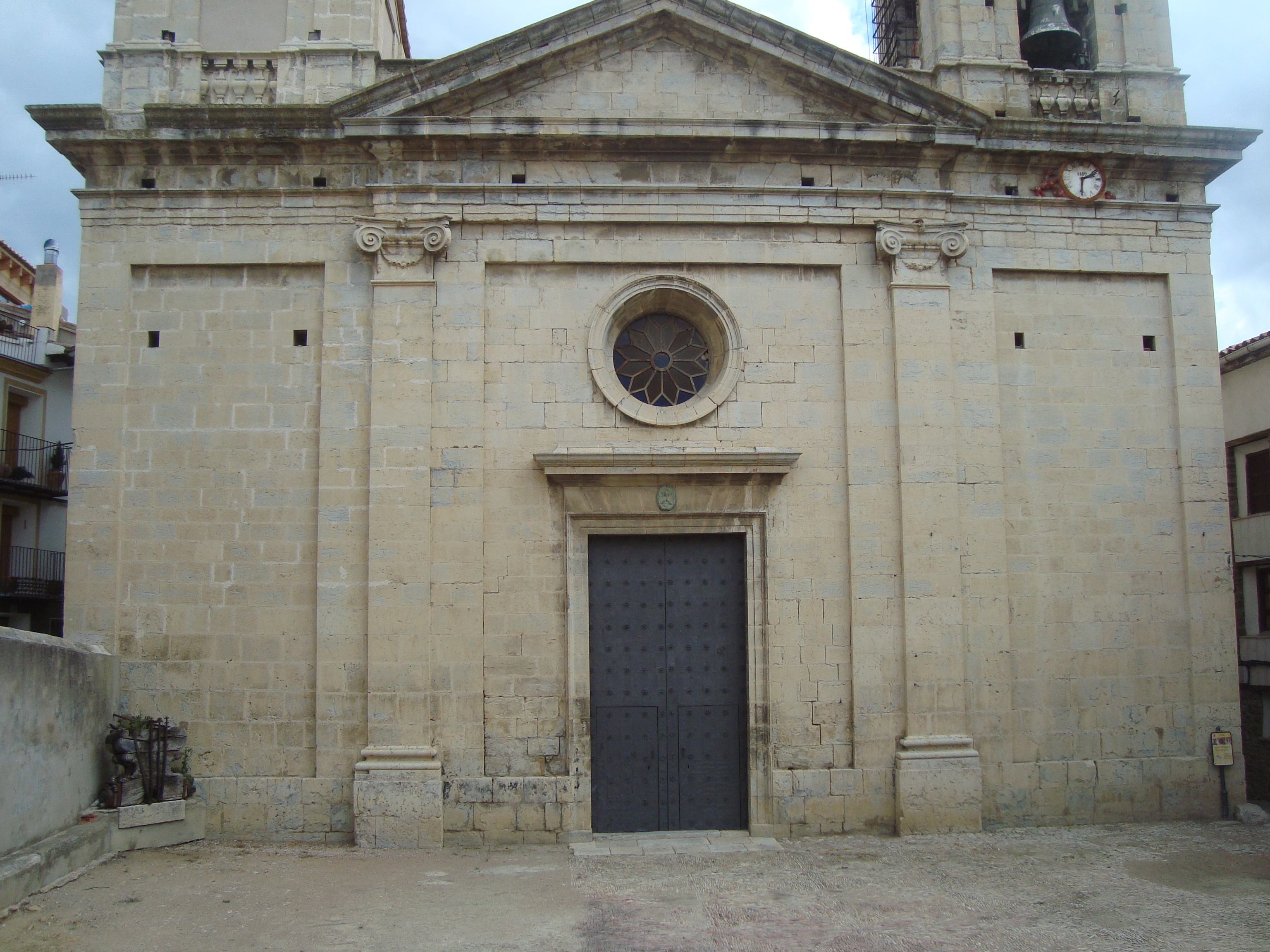 Església parroquial de l'Assumpció (Sorita) 01.141-005.